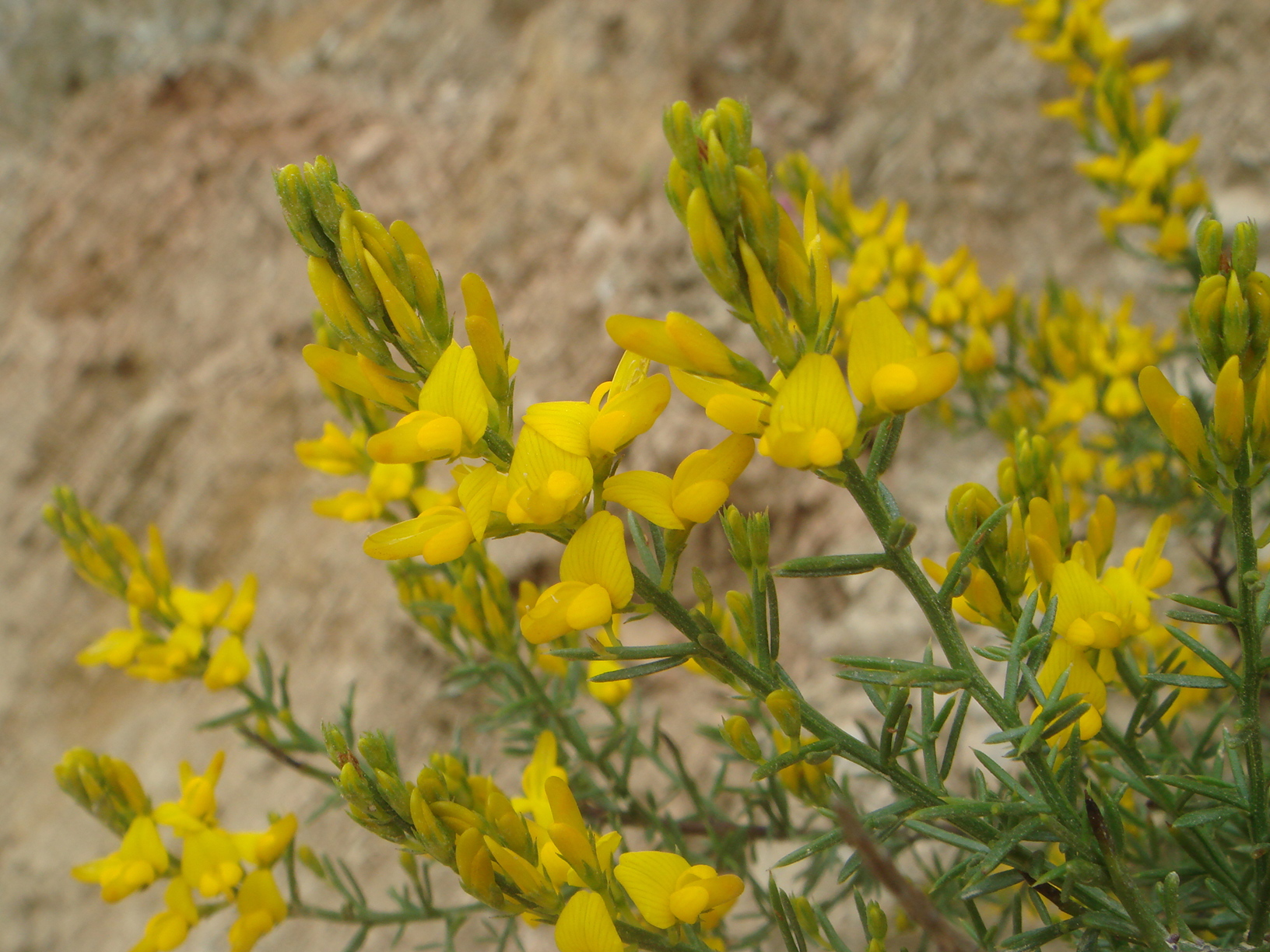 Aulaga de tres púas (Genista tridens), Ceuta, España.